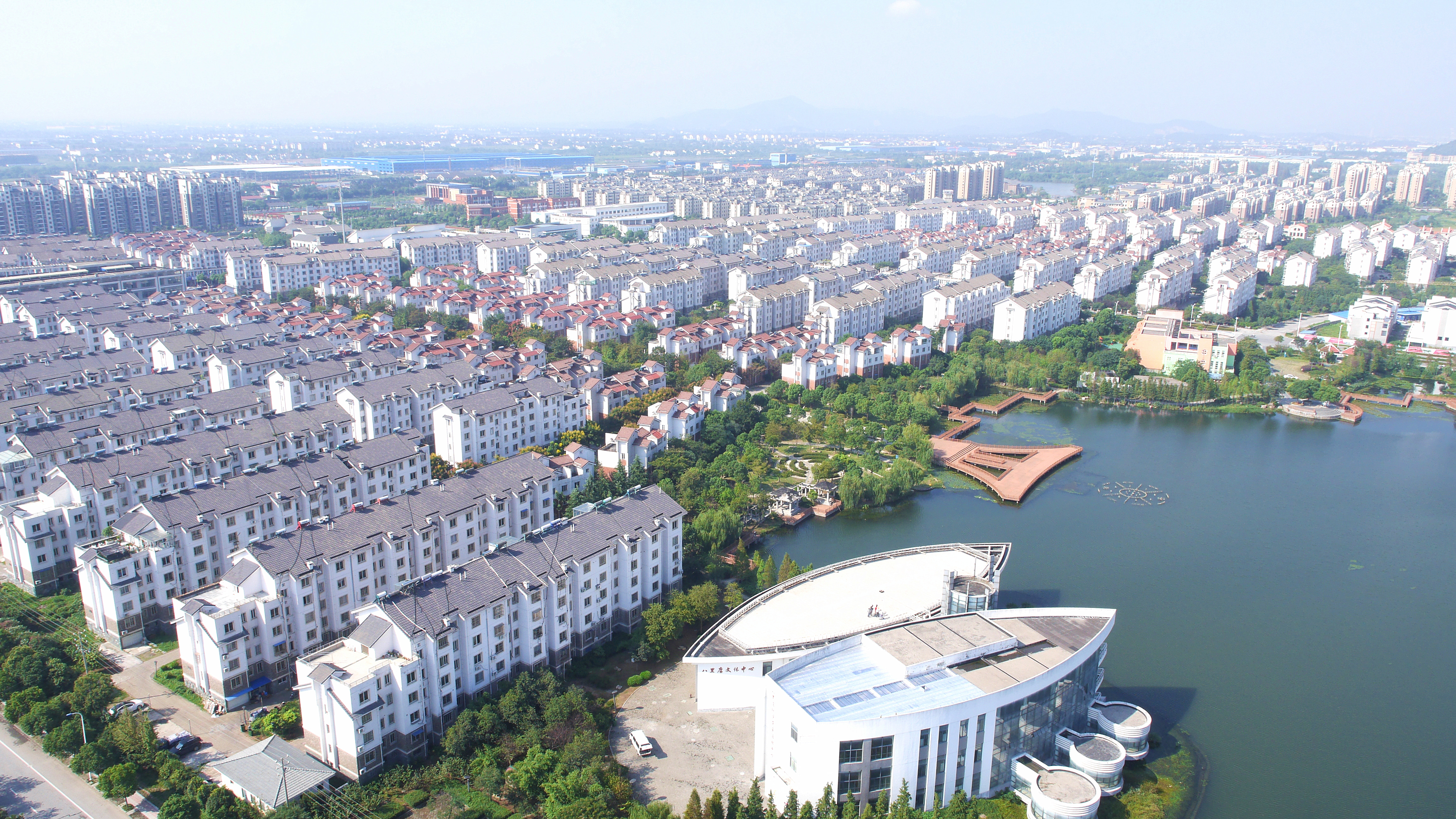 浙江湖州八里店新農村建設